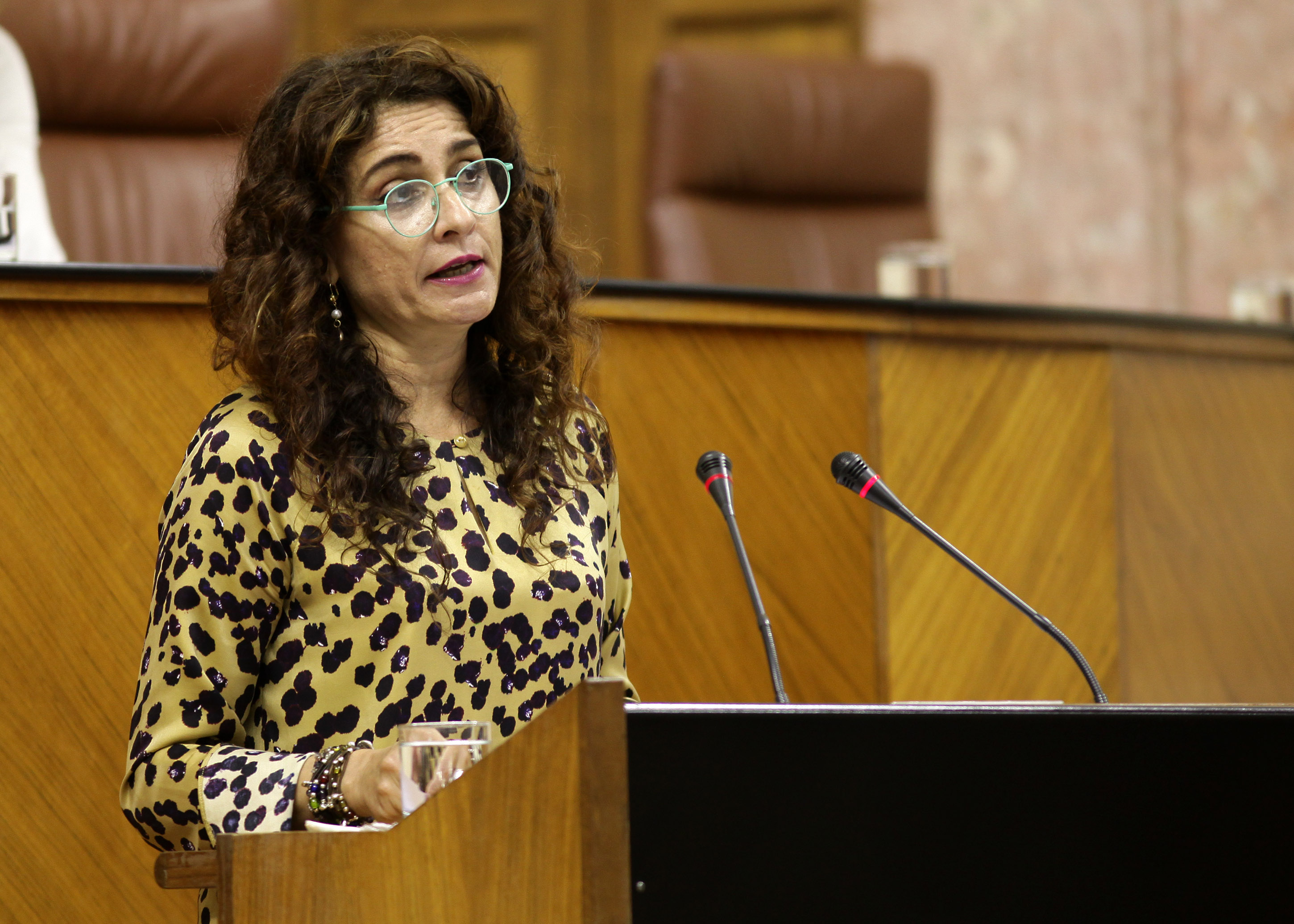 Parlamento de Andalucía. Sesión Plenaria 18/04/11.